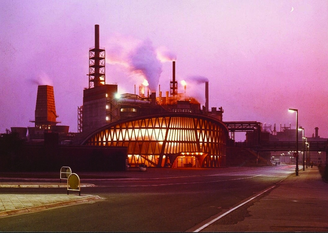 Einfahrt Chemiepark Knapsack, Huerth